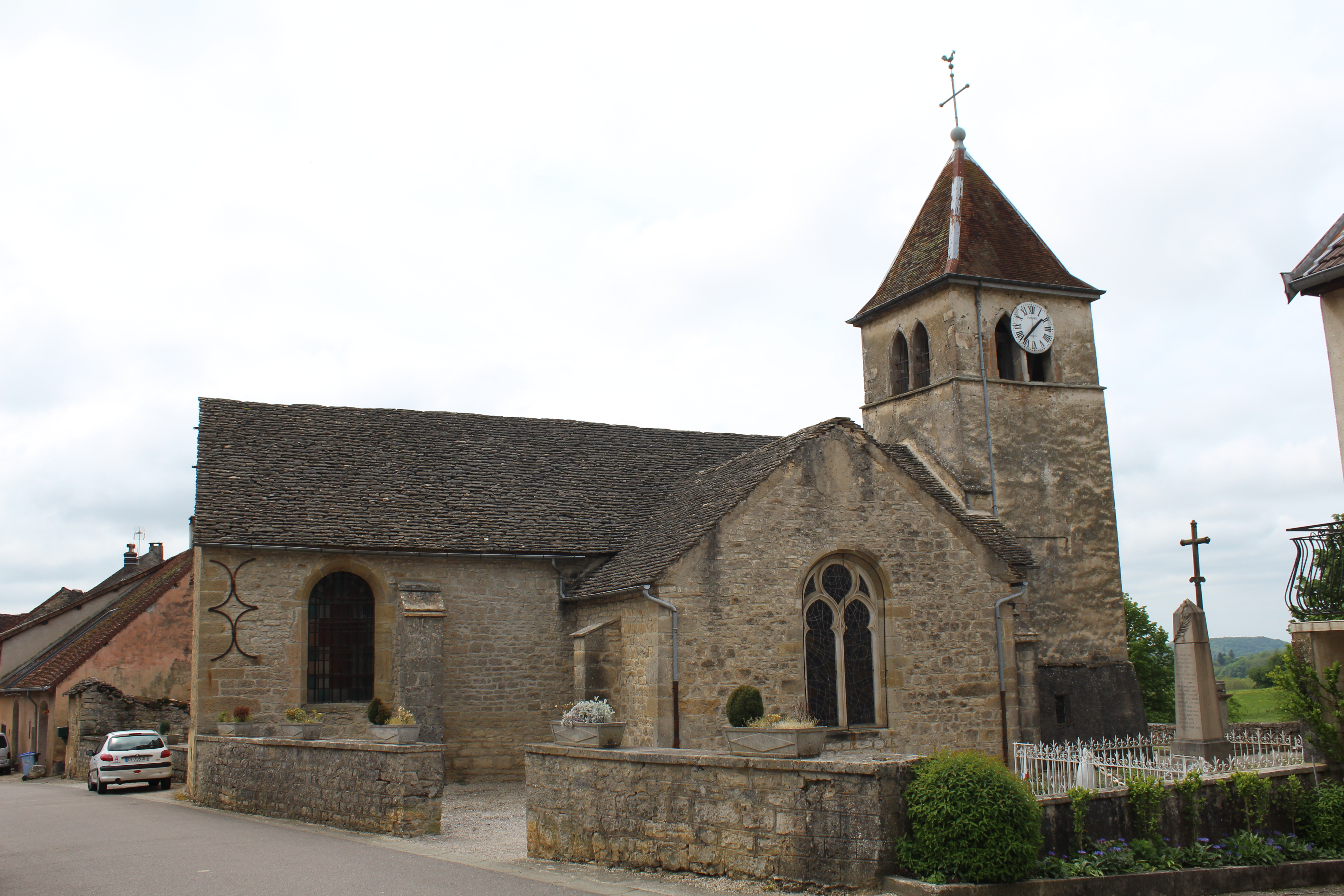 Église Saints-Jacques-et-Philippe de Pannessières.